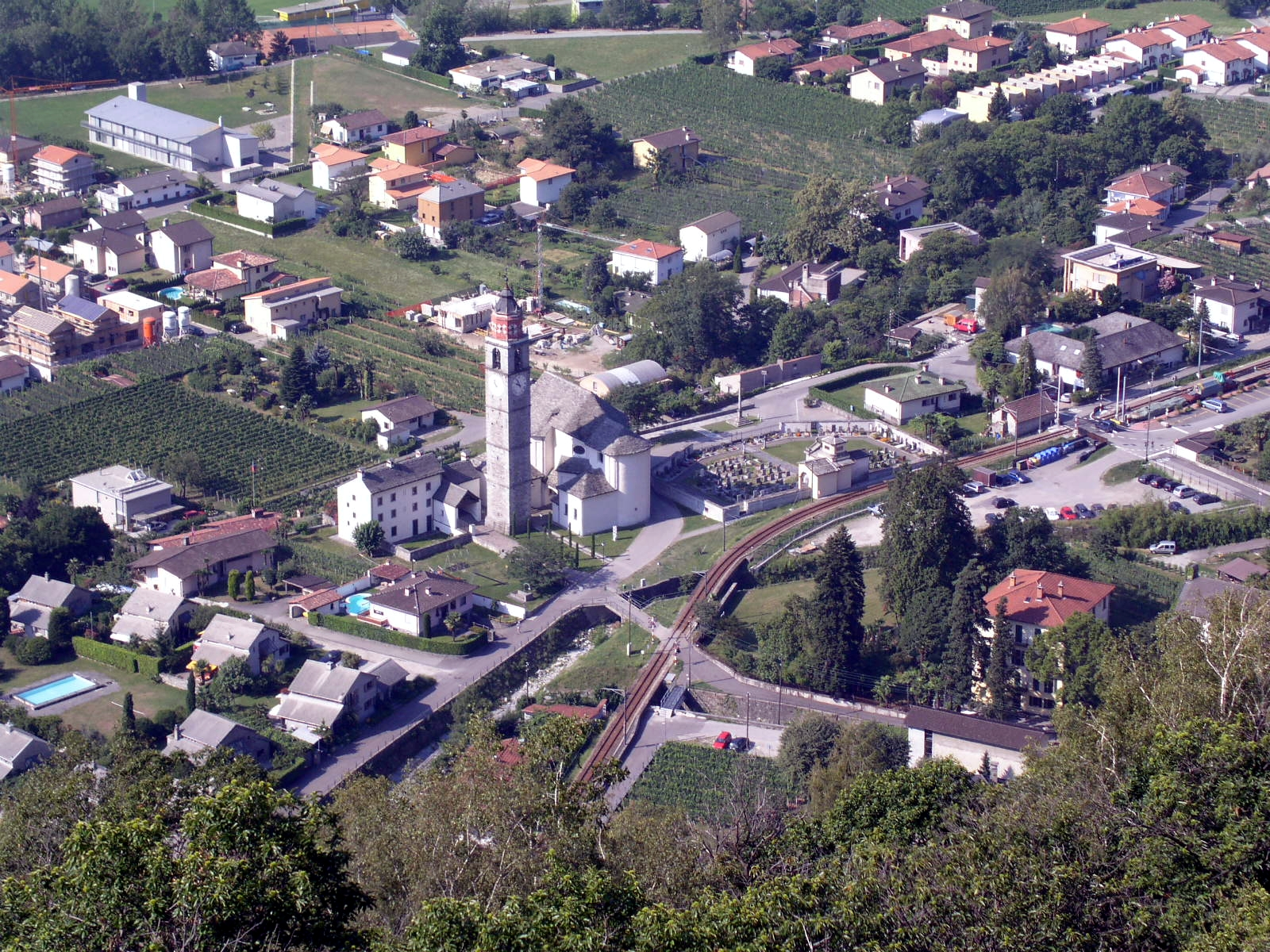 Bildbeschreibung: Verscio TI mit Kirche Quelle: Selbst fotografiert Fotograf/Zeichner: Selbst Crazy-Chemist 18:59, 26. Jul 2006 (CEST) Datum: 01.08.2004 Sonstiges: Aufnahmestandort Oratorium Madonna delle Scalate